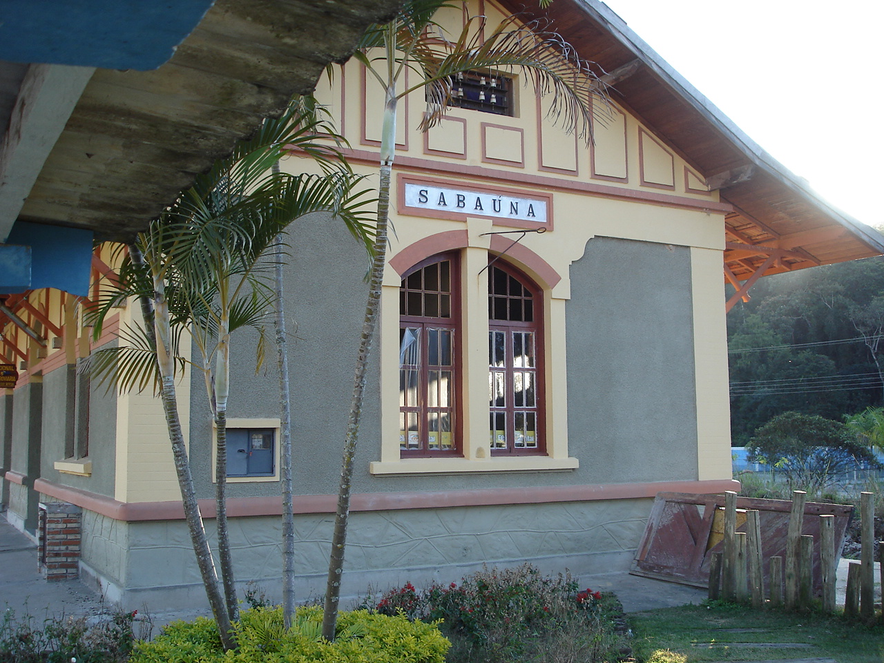 Estação Ferroviária de Sabaúna, Mogi das Cruzes (SP), vista de seu lado esquerdo, a partir da rua onde está situada.